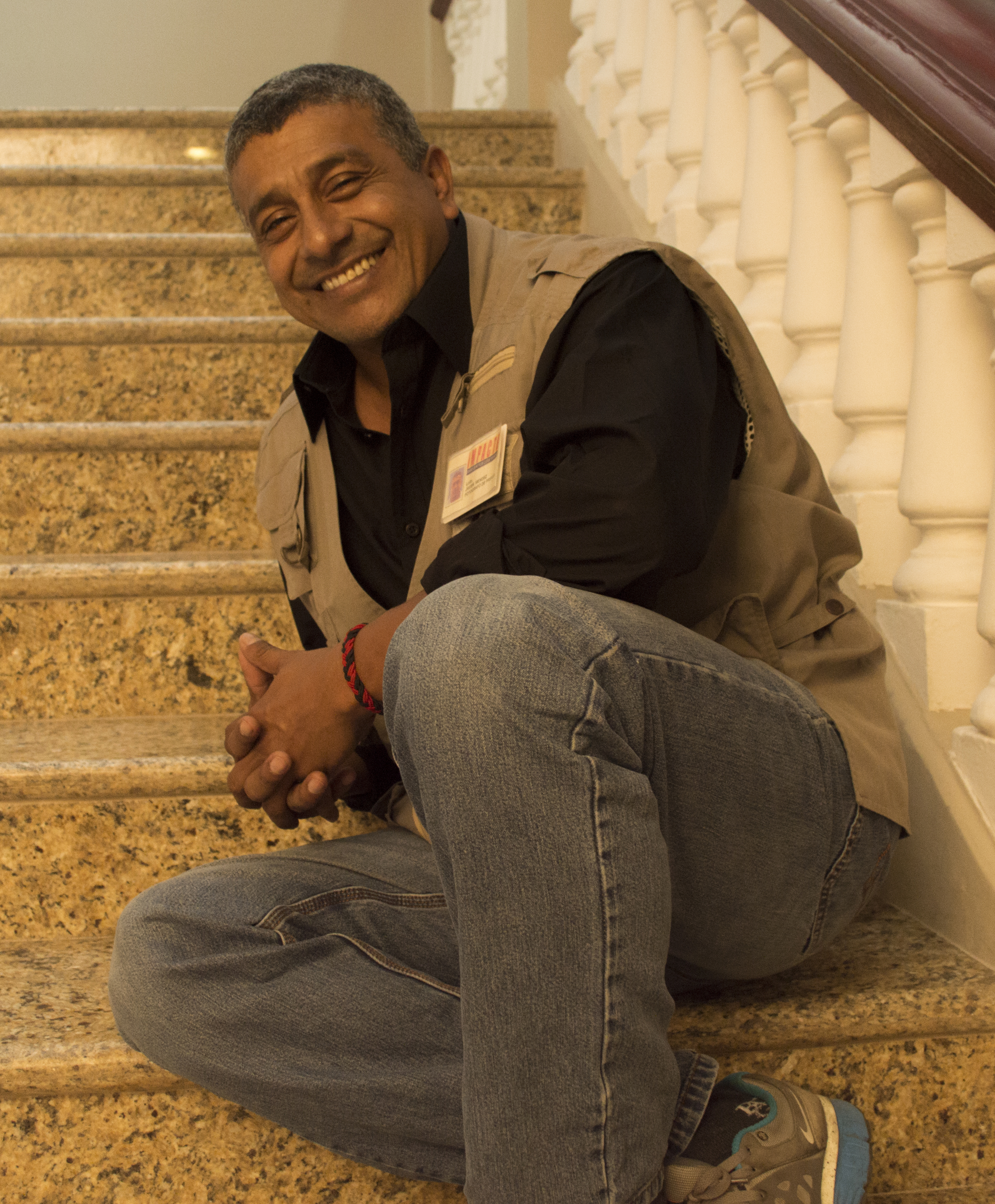 Carlos Valencia, actor de cine, teatro y televisión ecuatoriano, fotografiado en 2015.